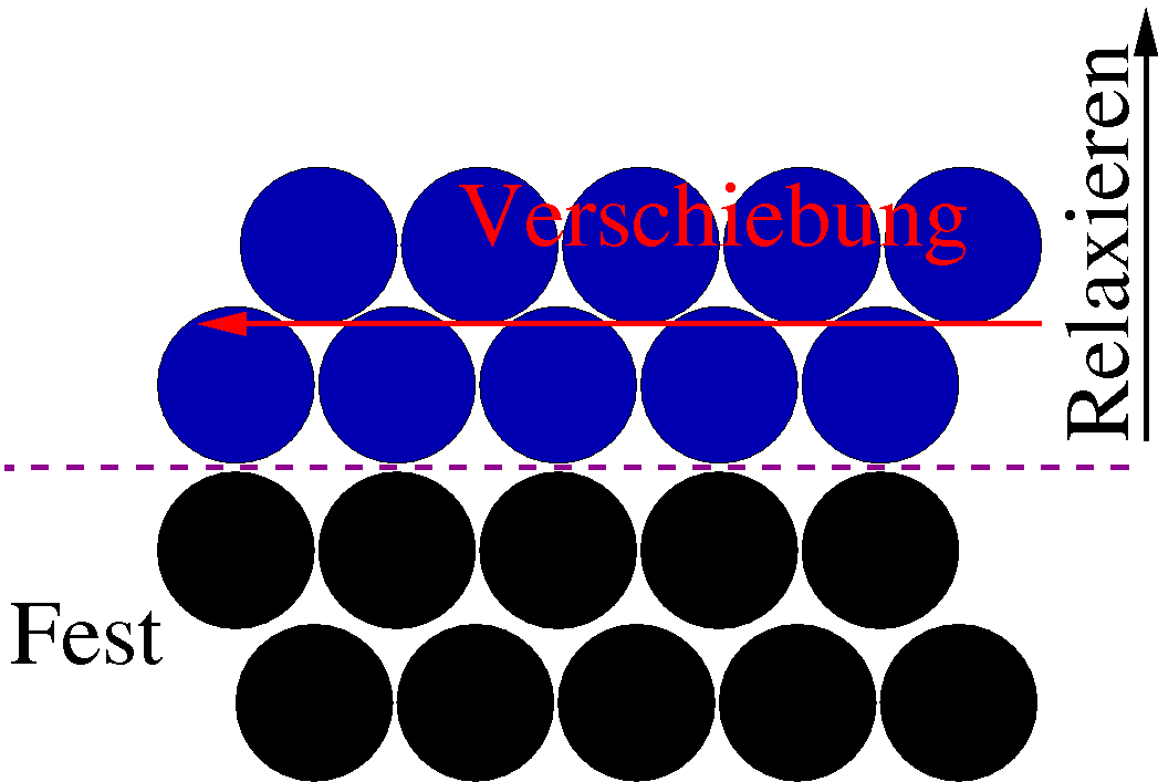 Messung der verallgemeinerten Stapelfehlerenergie